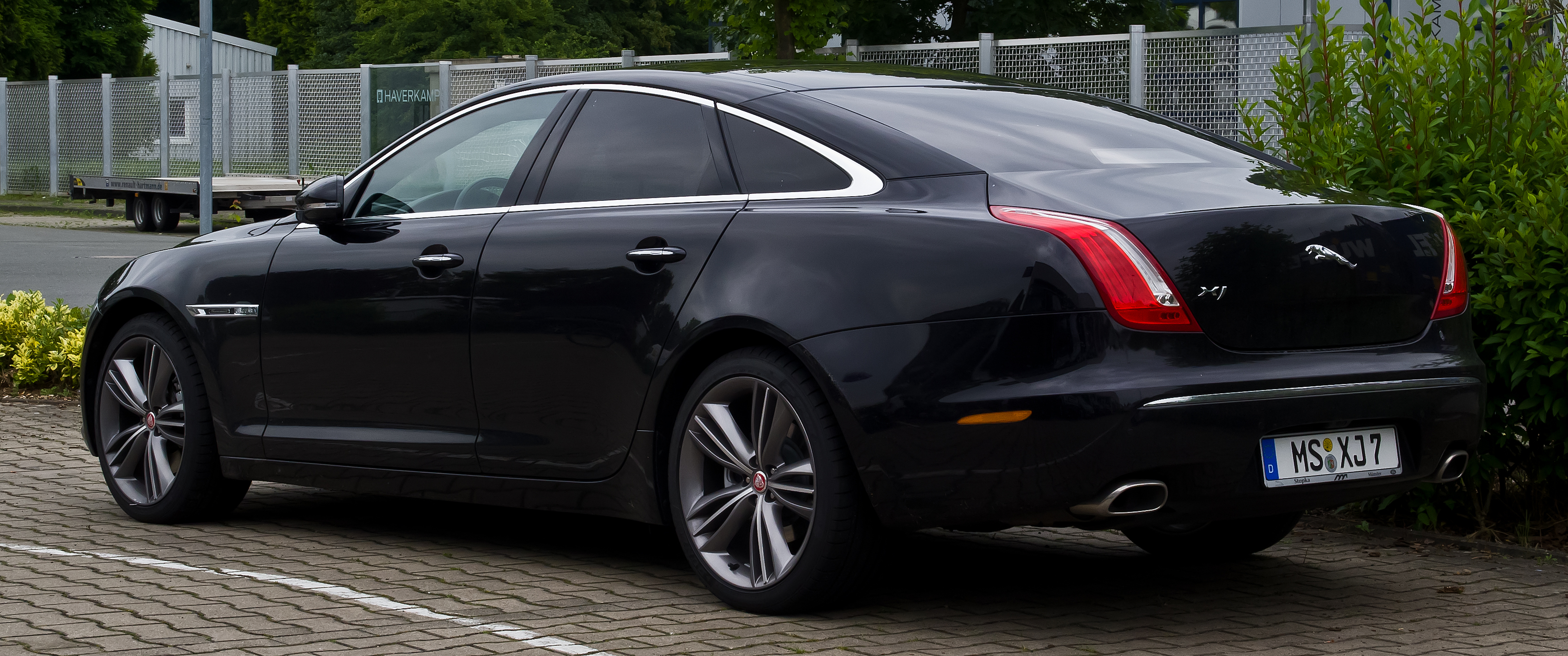 Jaguar XJ 3.0 D-S Supersport (X351)